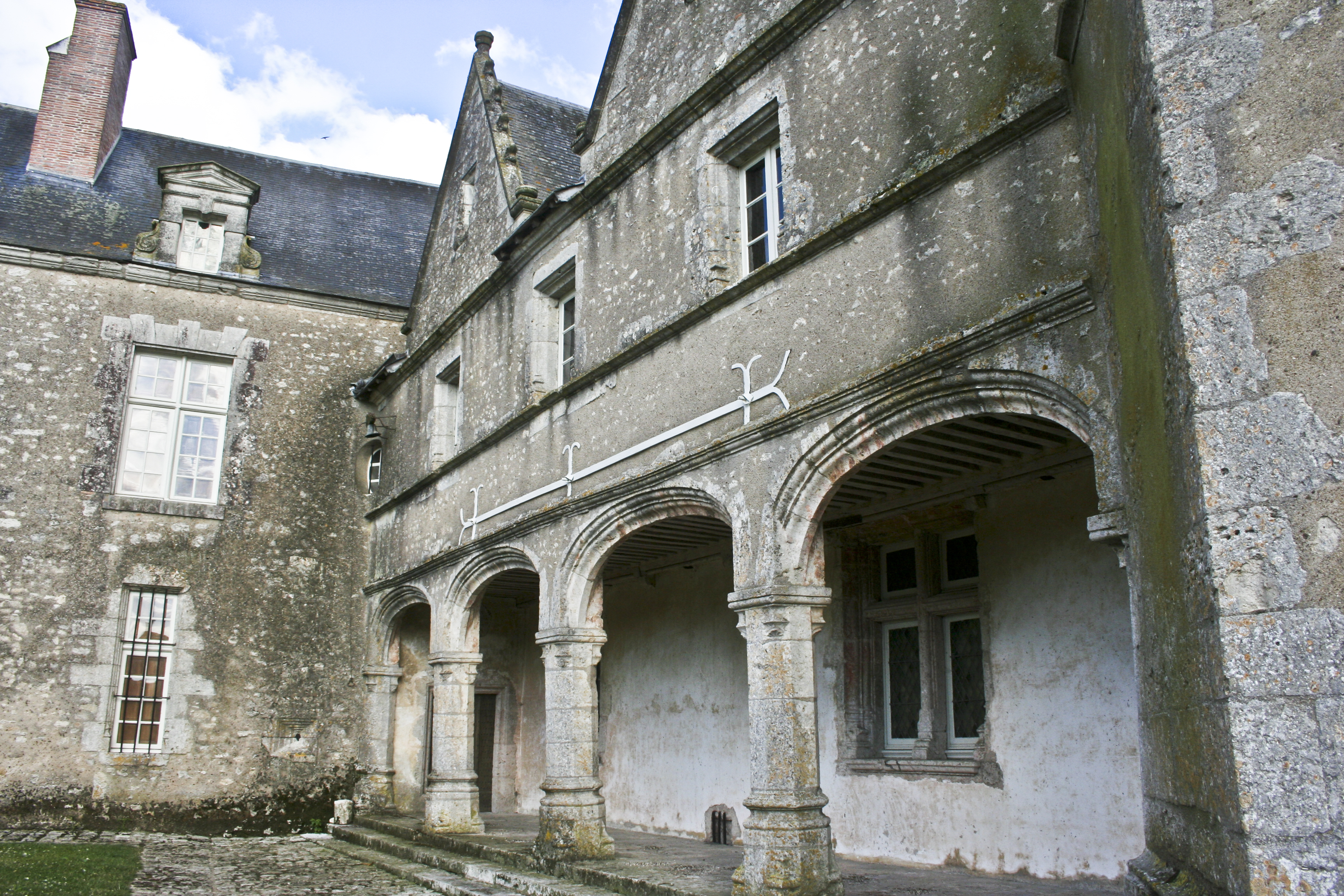 Château de Talcy (Loir-et-Cher), cour intérieure